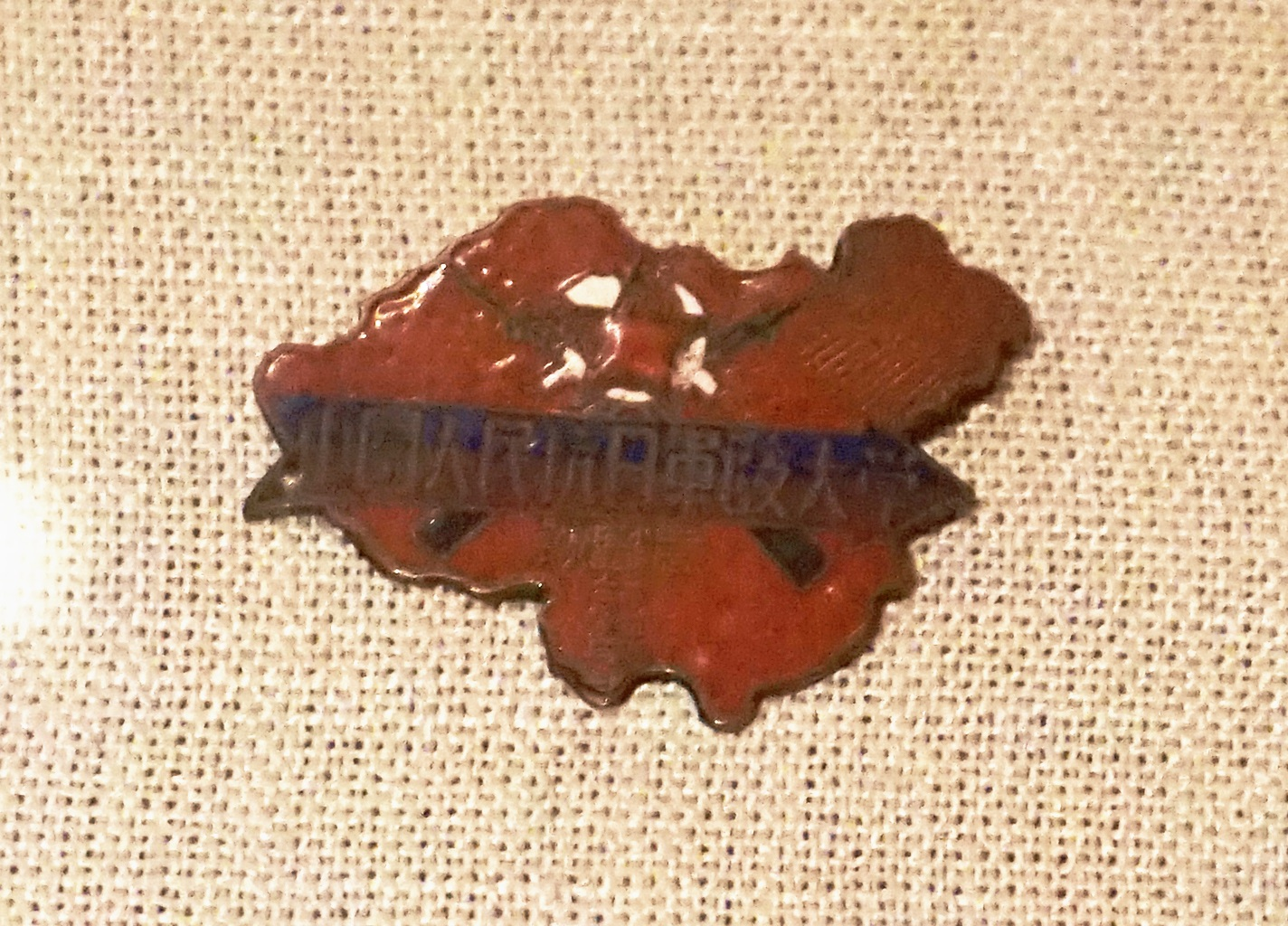 中国人民抗日军政大学教职员证章